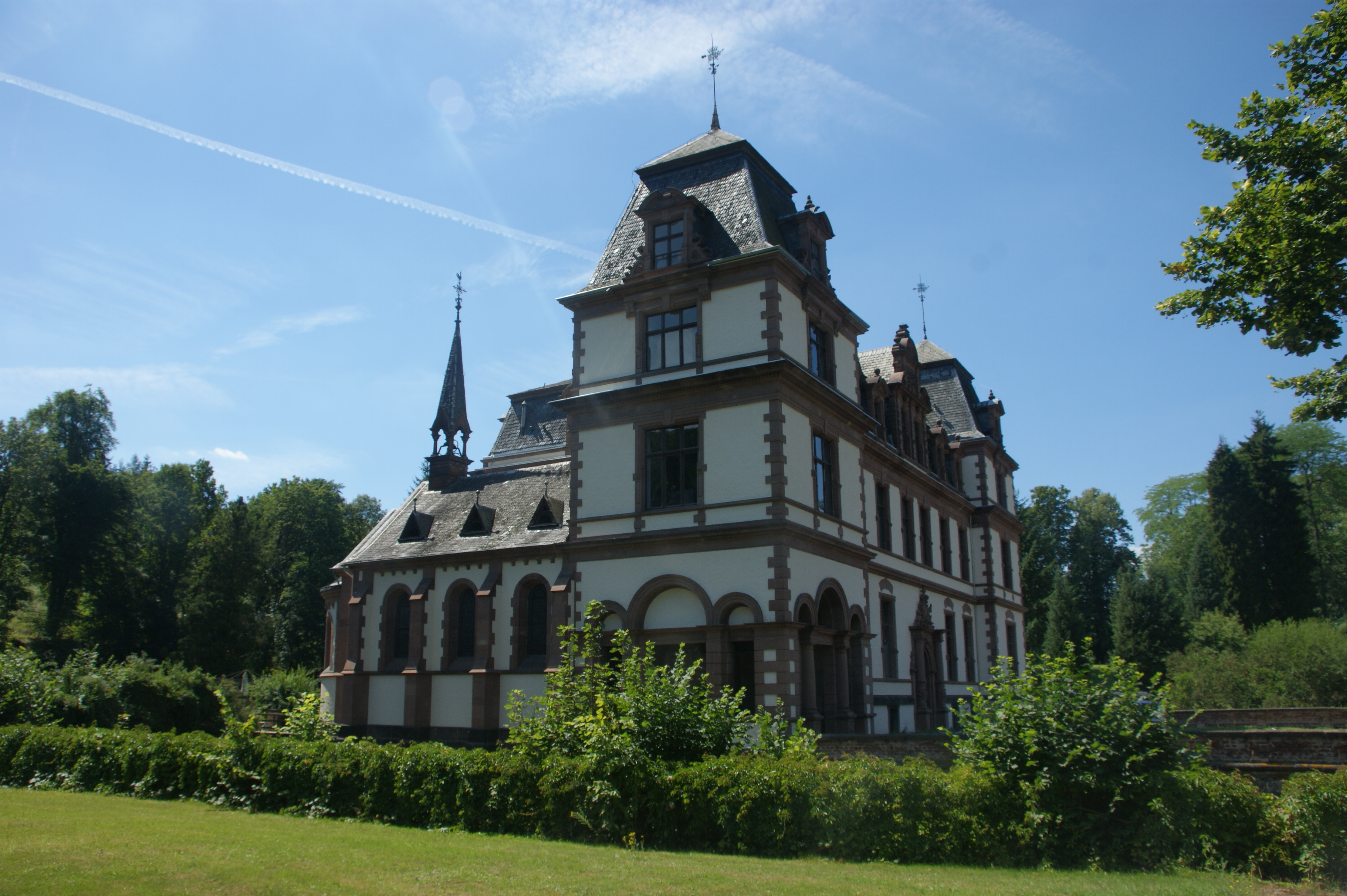 Schloss Ahrenthal in Sinzig